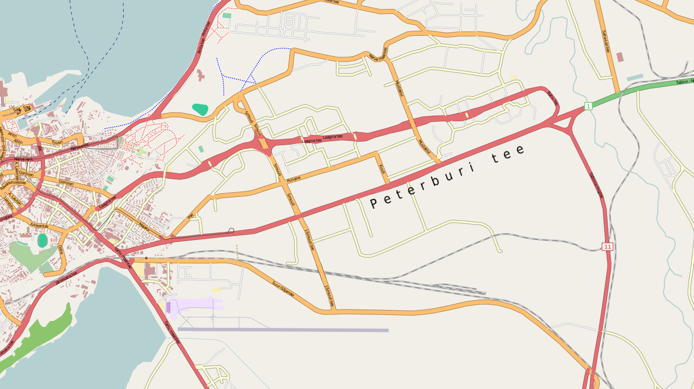 Peterburi tee kaart OpenStreetMapi kodulehelt. Muudetud 'Peterburi tee' kirja suurust pilditöötlustarkvaraga GIMP.